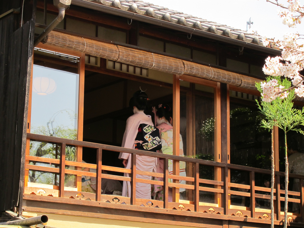 Real geisha and Maiko at Gion area in kyoto, Japan; %u82B8%u8005%u3068%u821E%u5993%u3001%u7947%u5712%u3001%u4EAC%u90FD